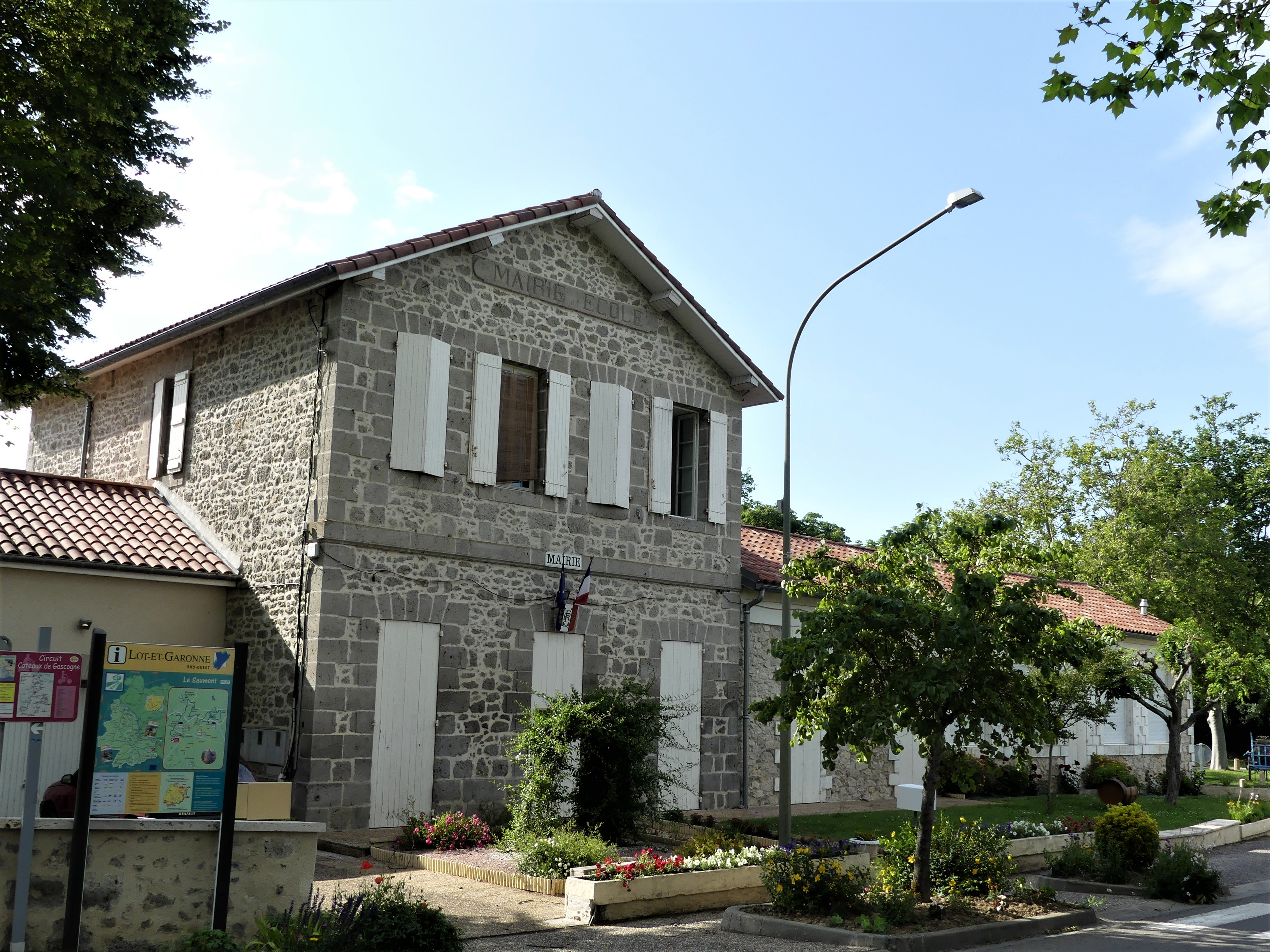 La mairie de Saumont, Lot-et-Garonne, France.